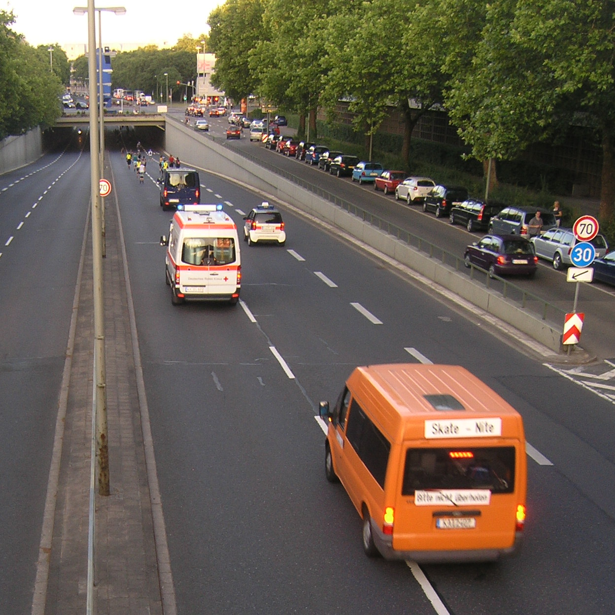 Karlsruher SkateNite, Schluss durch 4 Kfz